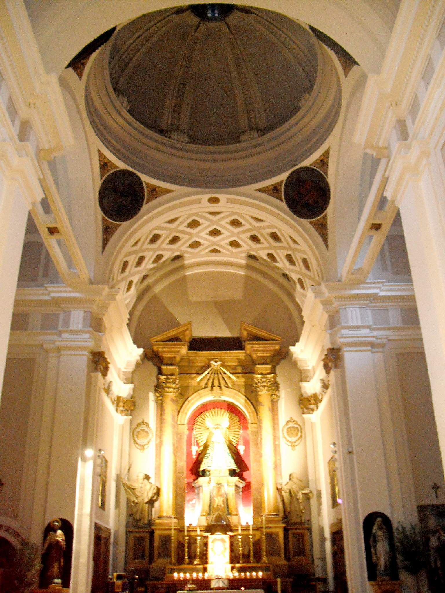 Iglesia de los Santos Justo y Pastor (o de las Maravillas), en Madrid